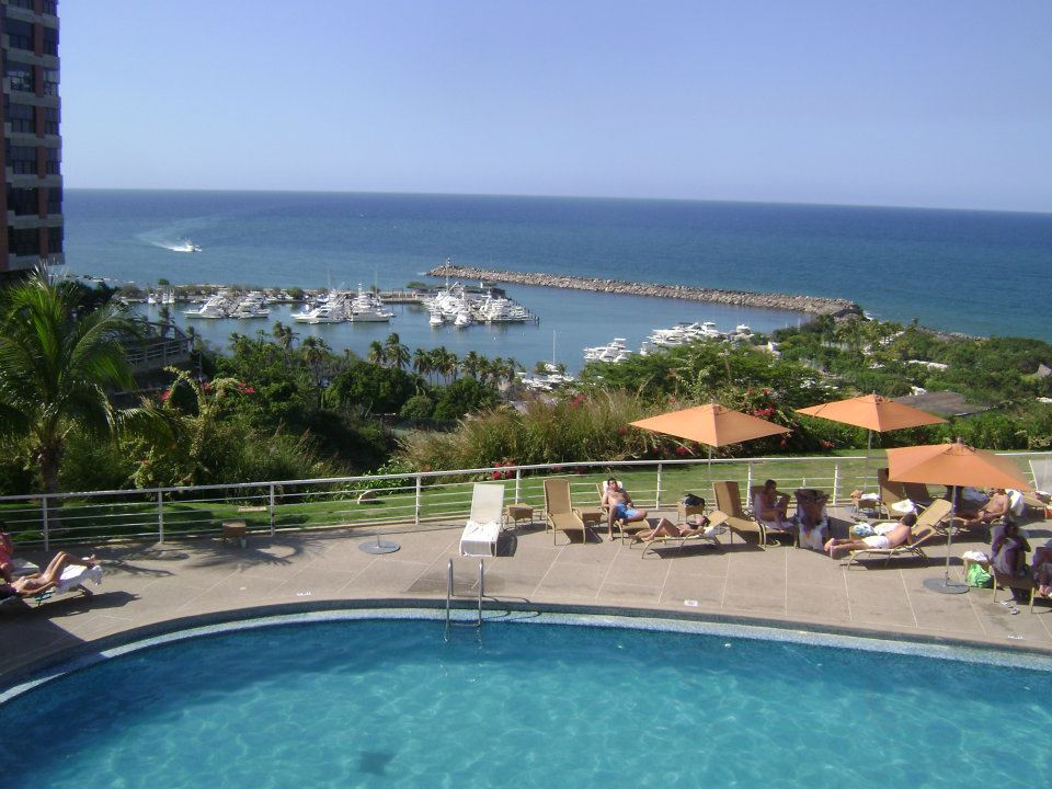 Hermosa Vista del Mar Caribe al fondo